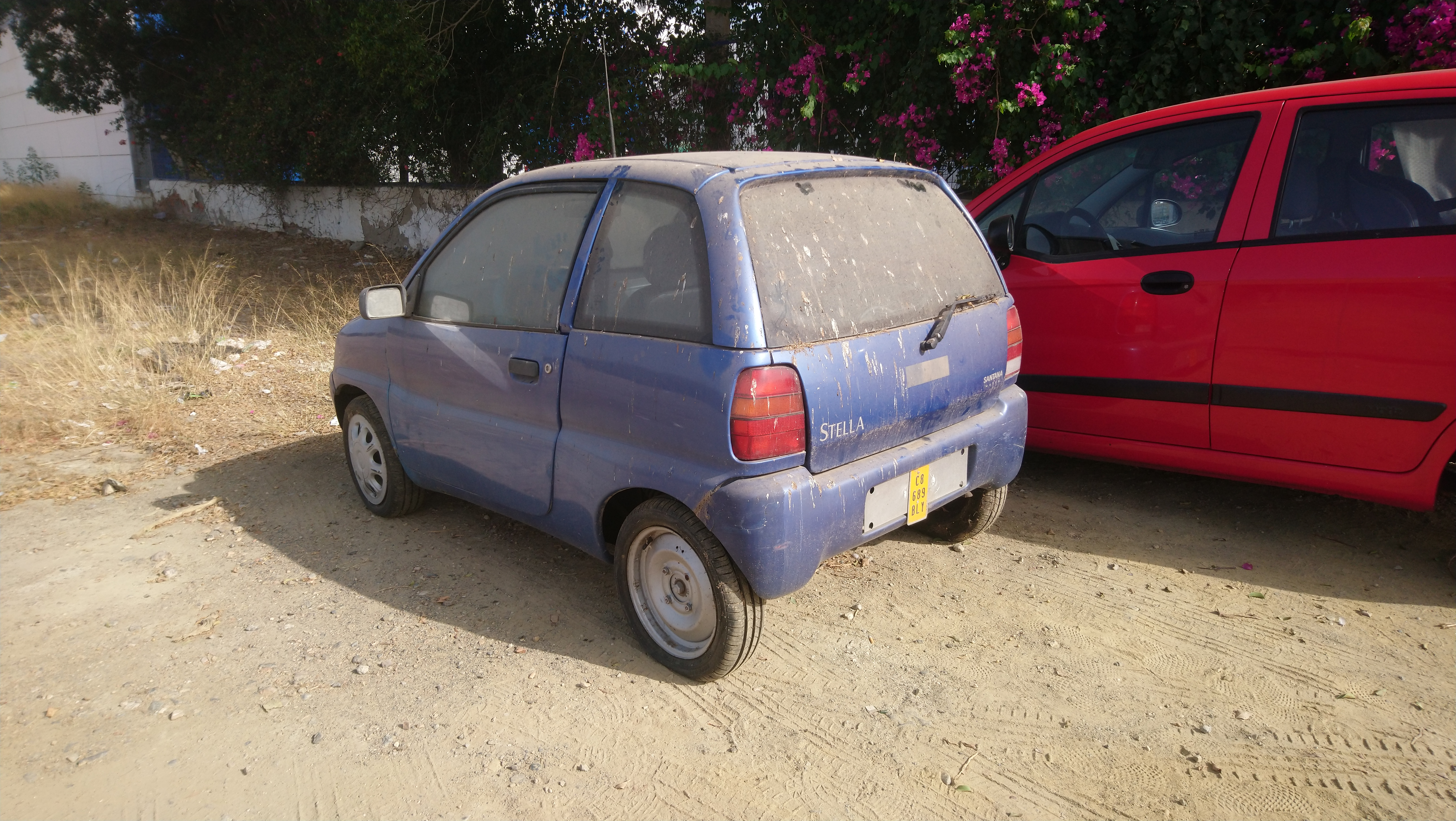 Trasera de Santana Stella